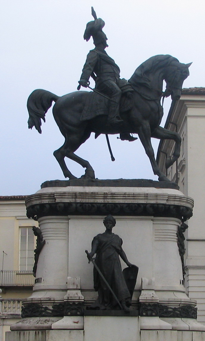 Odoardo Tabacchi, Monumento a Umberto I re d'Italia ad Asti, in Piazza Cairoli.